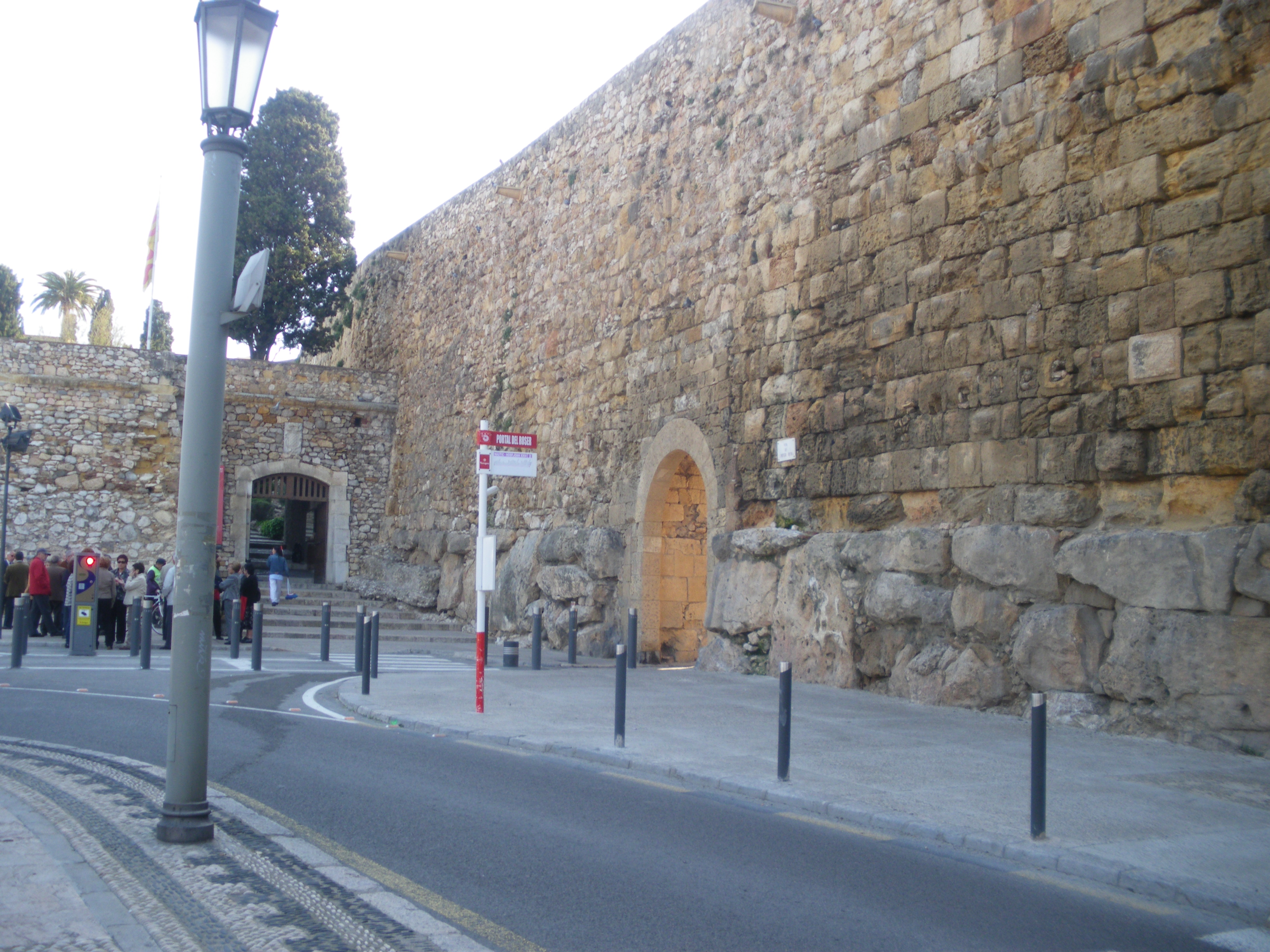 Foto del portal de Roser de Tarragona.